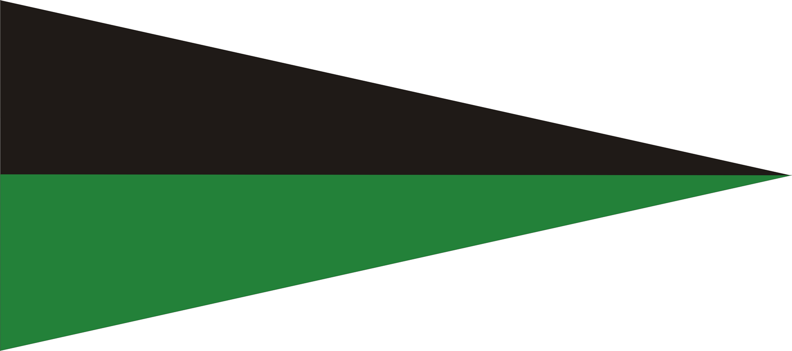 Proporczyk artylerii motorowej (na kołnierz) wprowadzony w Wojsku Polskim w Anglii w 1941